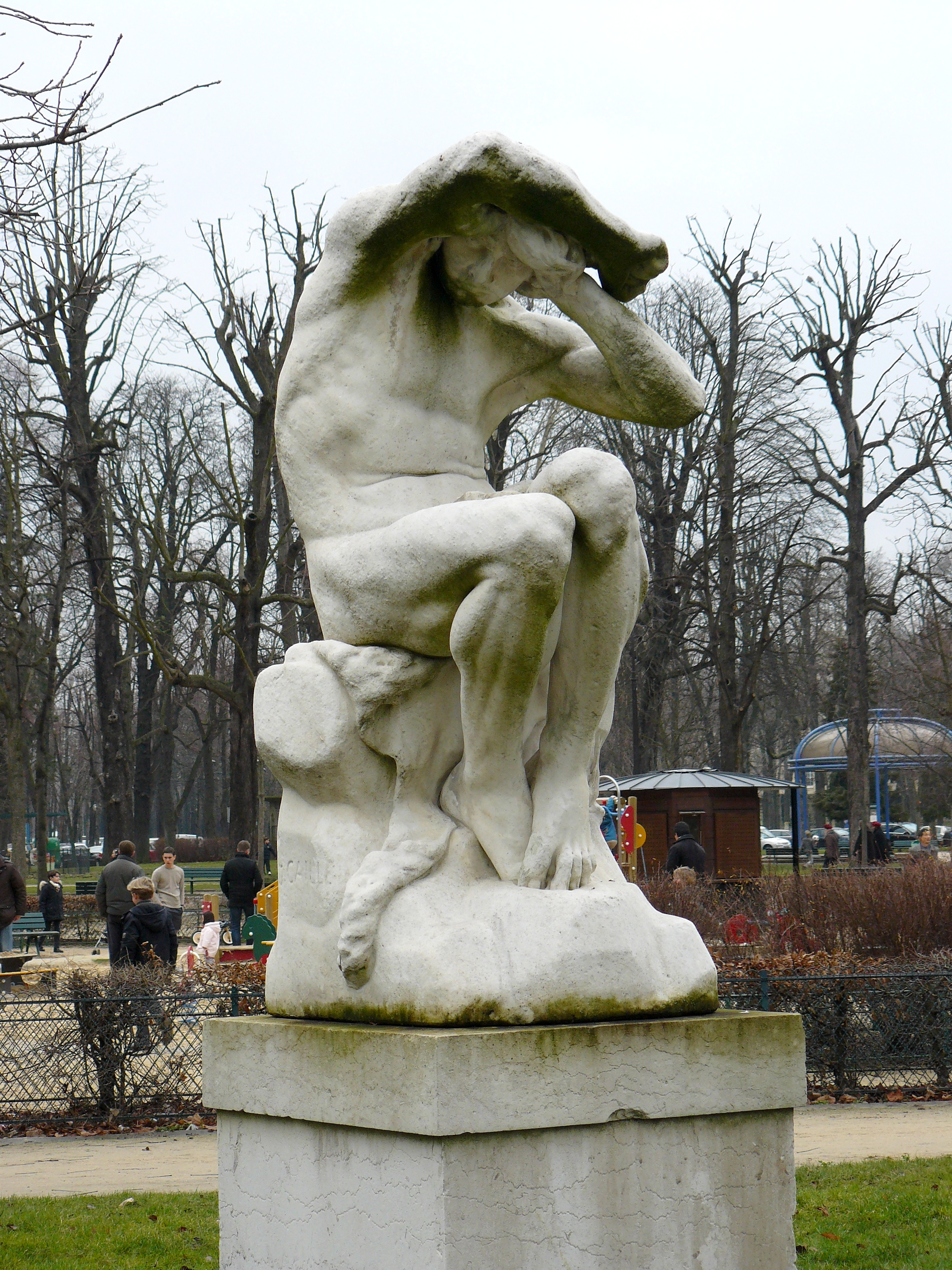 Caïn, marbre (1871) par Joseph Caillé (1836-1881) - Jardin du Ranelagh, Paris (16e arrond.) - Une oeuvre identique se trouve au musée de Nantes.